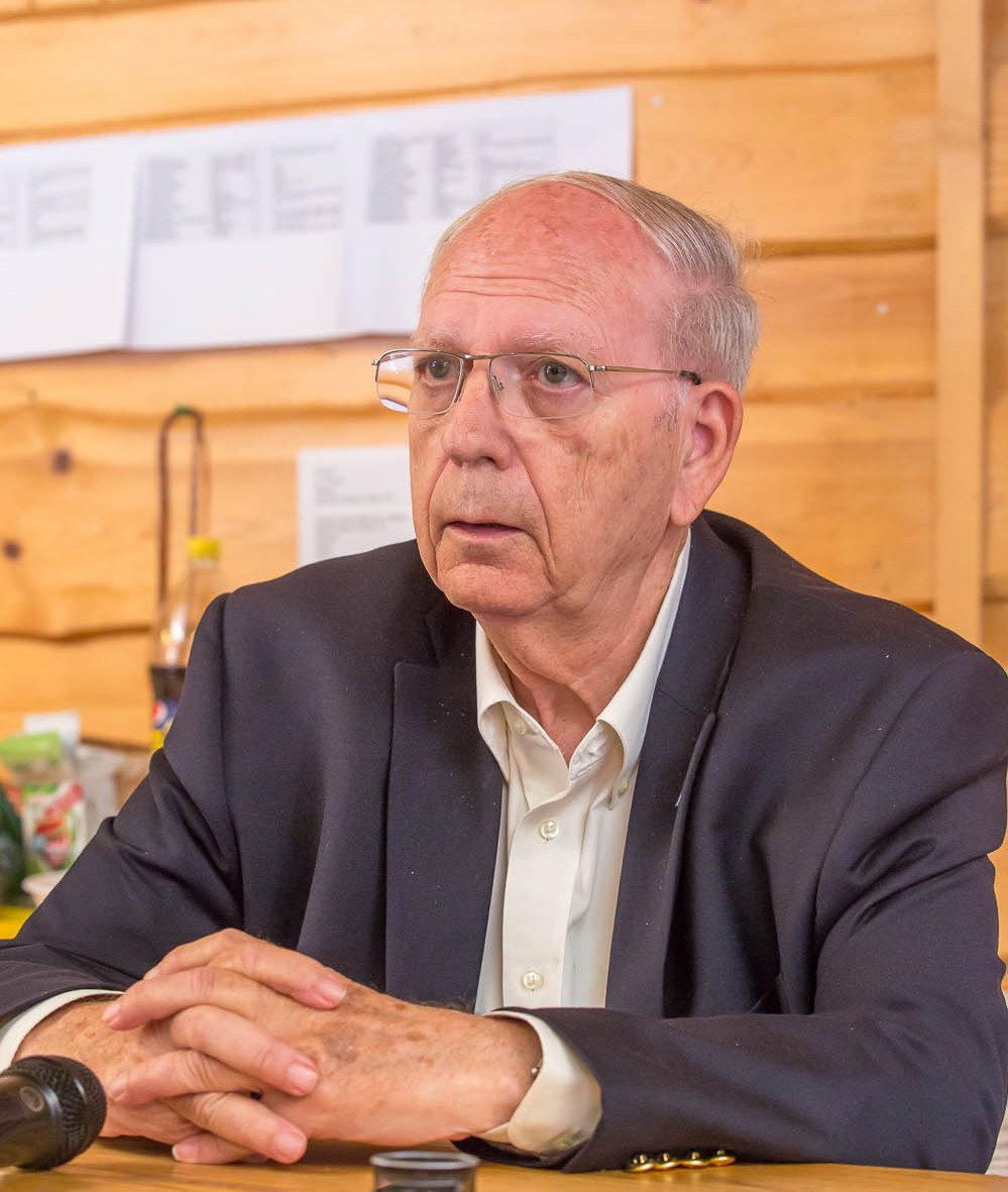 אפרים הלוי הוא איש מודיעין ודיפלומט ישראלי יליד אנגליה, ראש "המוסד" התשיעי, כיהן גם כראש המועצה לביטחון לאומי.